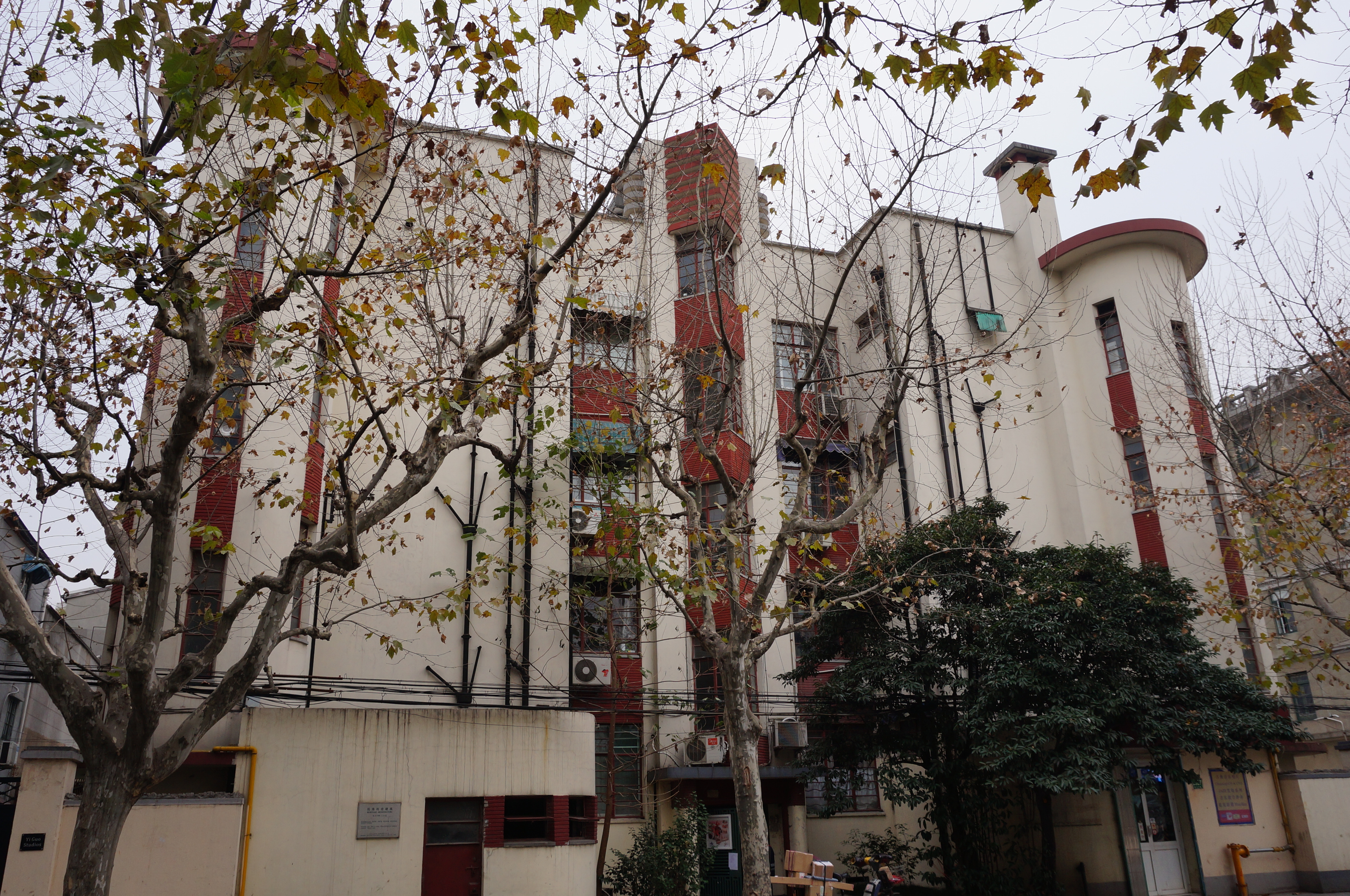 复兴中路伊丽莎白公寓